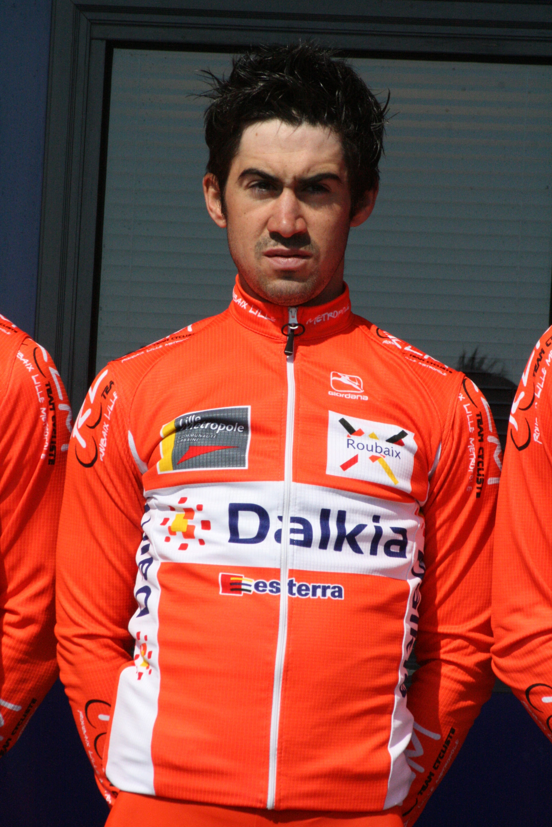 Présentation des coureurs au départ de la première étape Julien Guay